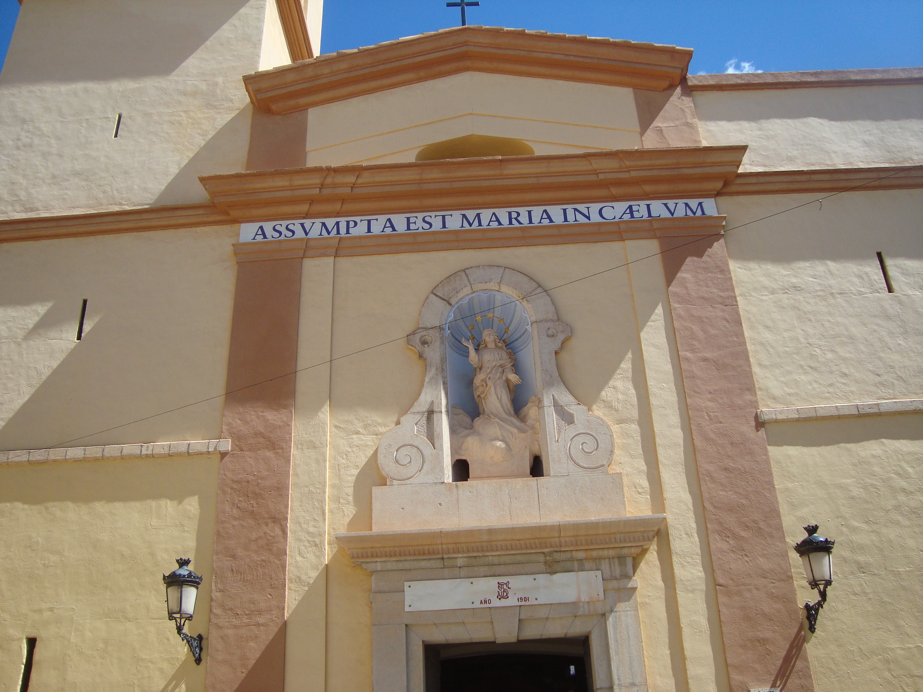 Església parroquial de l'Assumpció (l'Alcora) 04.005-011.